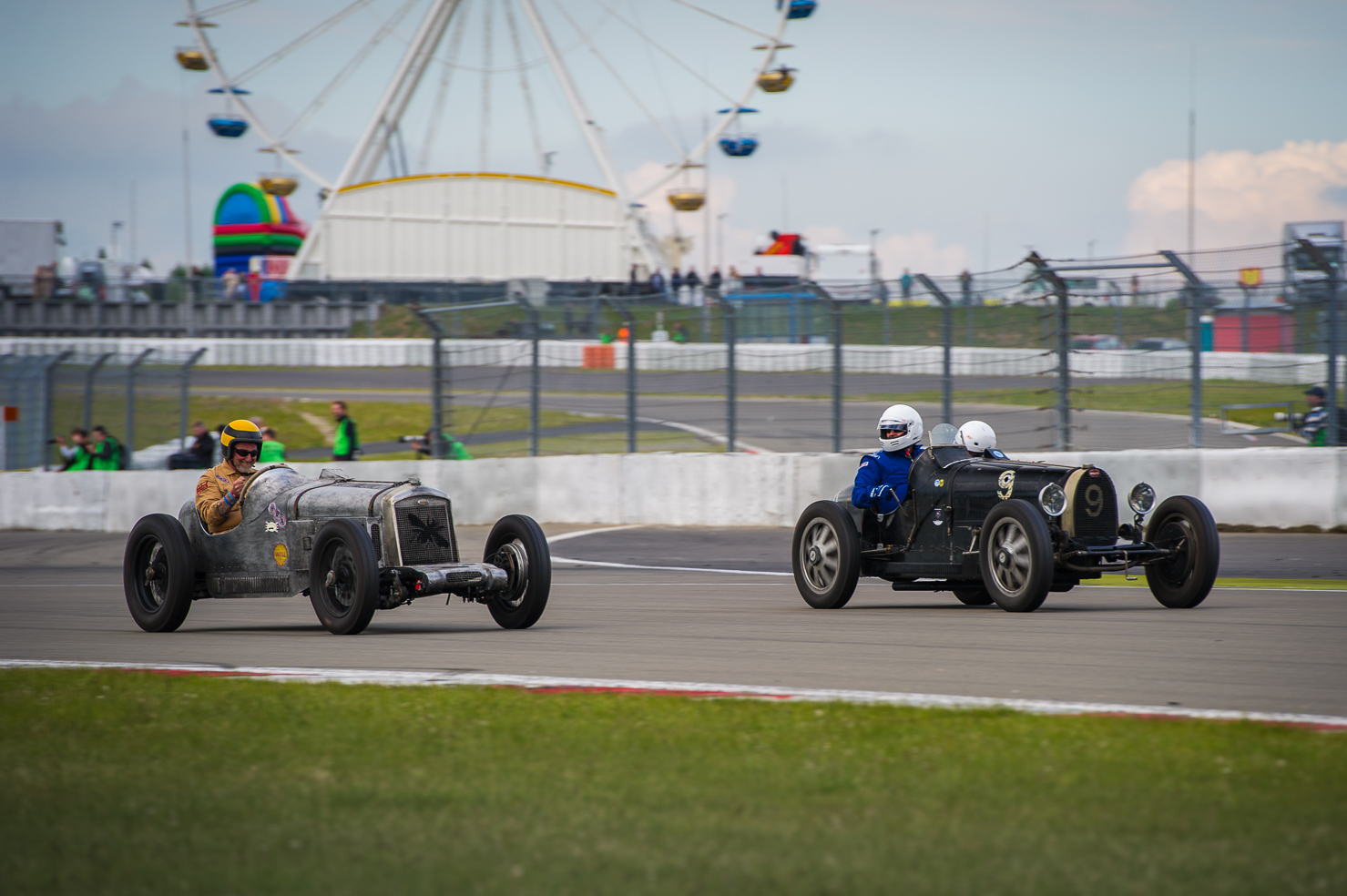 Spannende Zweikämpfe der Prewars & Vintage Cars auf dem Nürburgring.